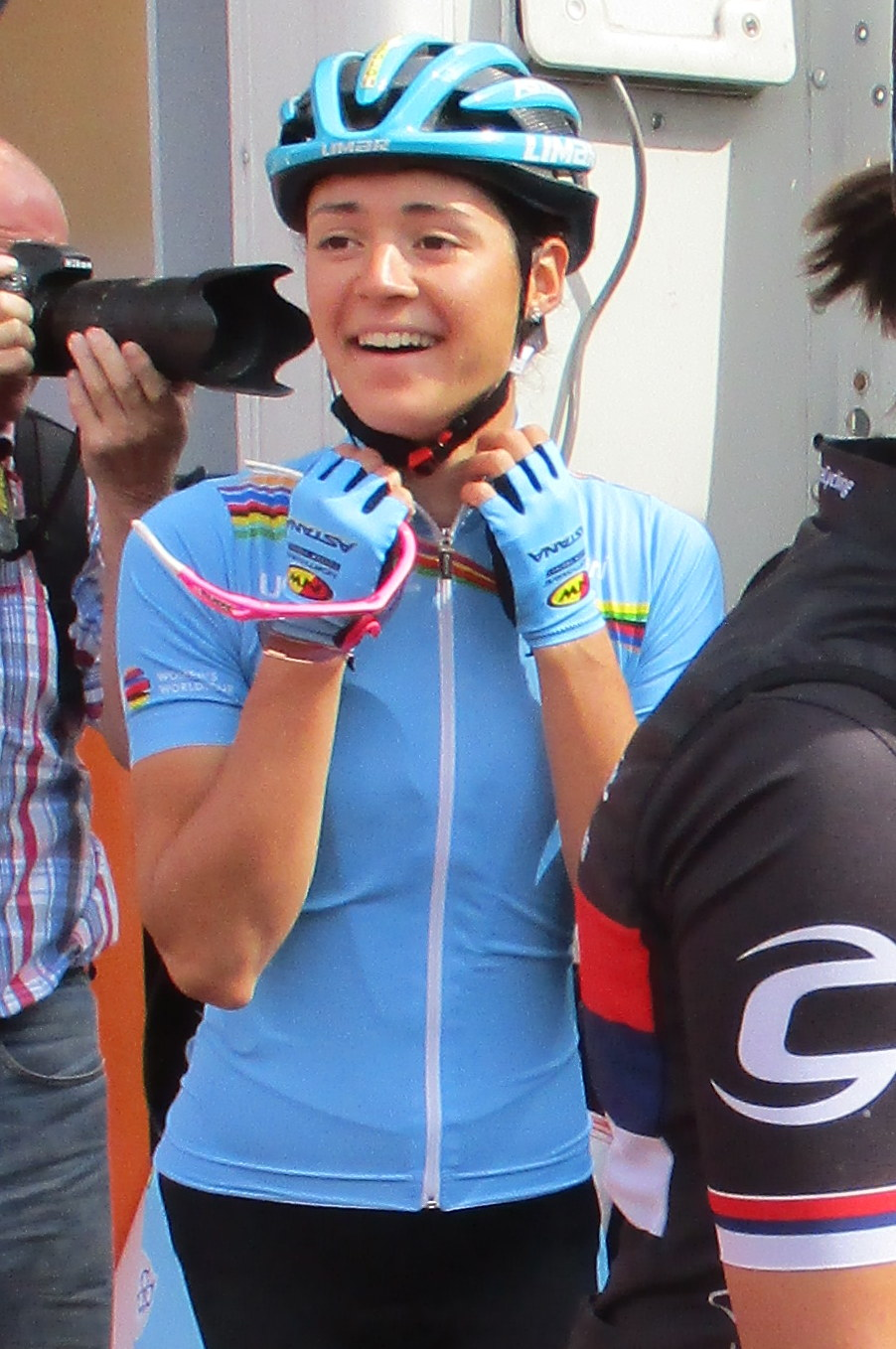 4e etappe van de Boels Ladies Tour 2018 door Noord-Limburg, start in Stramproy.